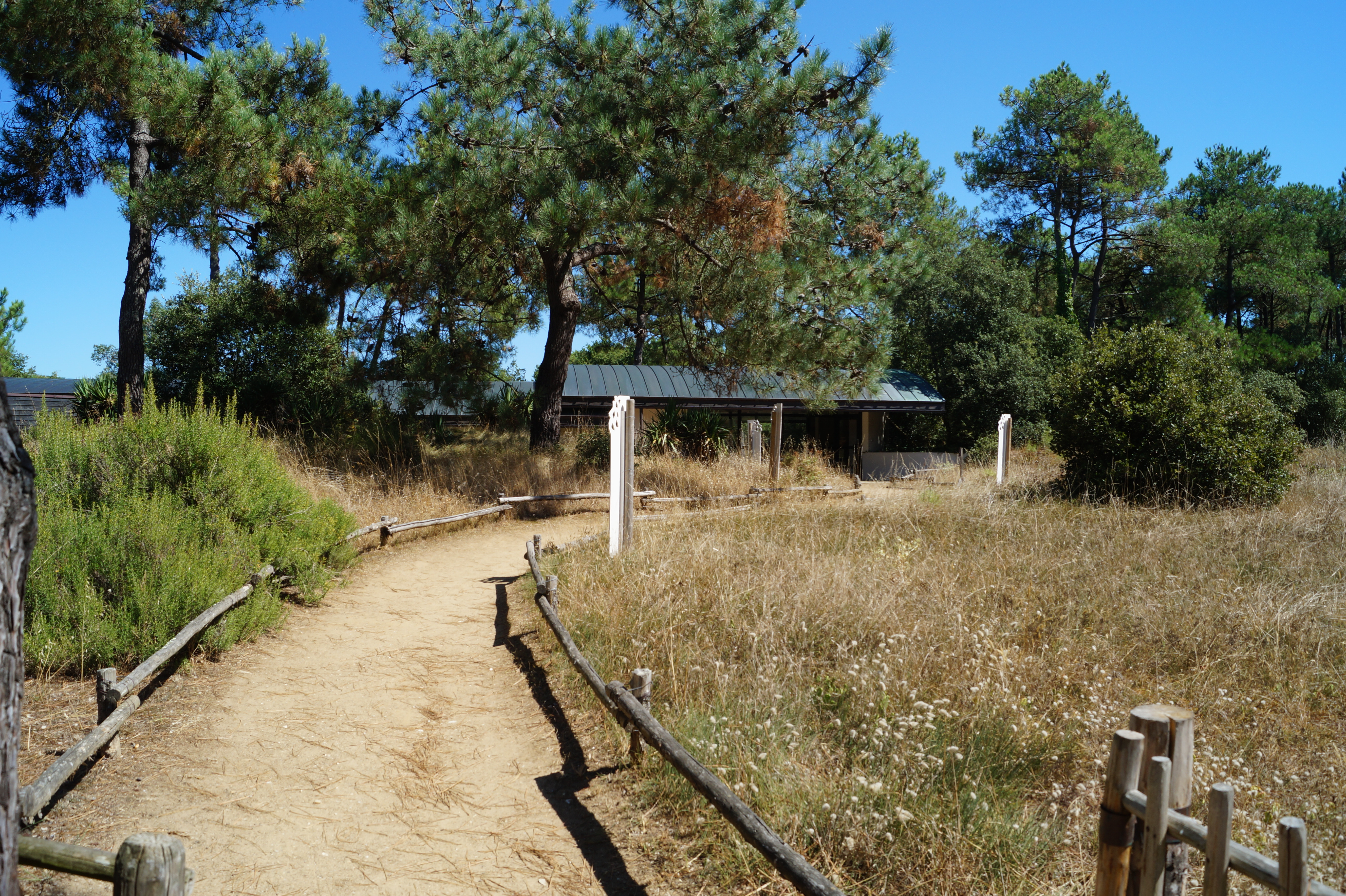 L’écomusée et son allée depuis le site de la bourrine.